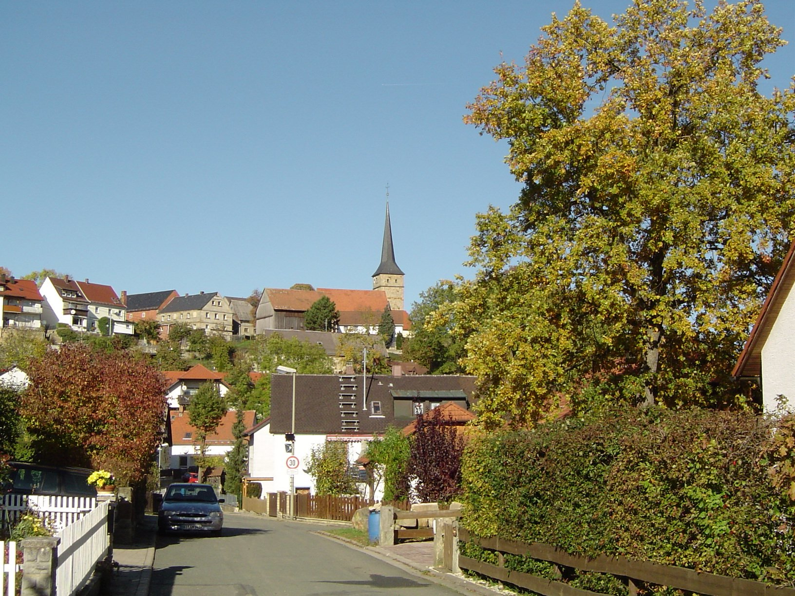 Mistelbach (Oberfranken), Thalweg